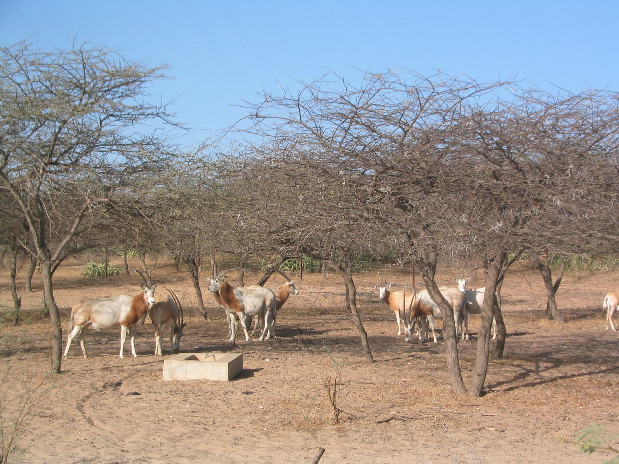 Oryx dammah à la réserve de Guembeul (Sénégal)